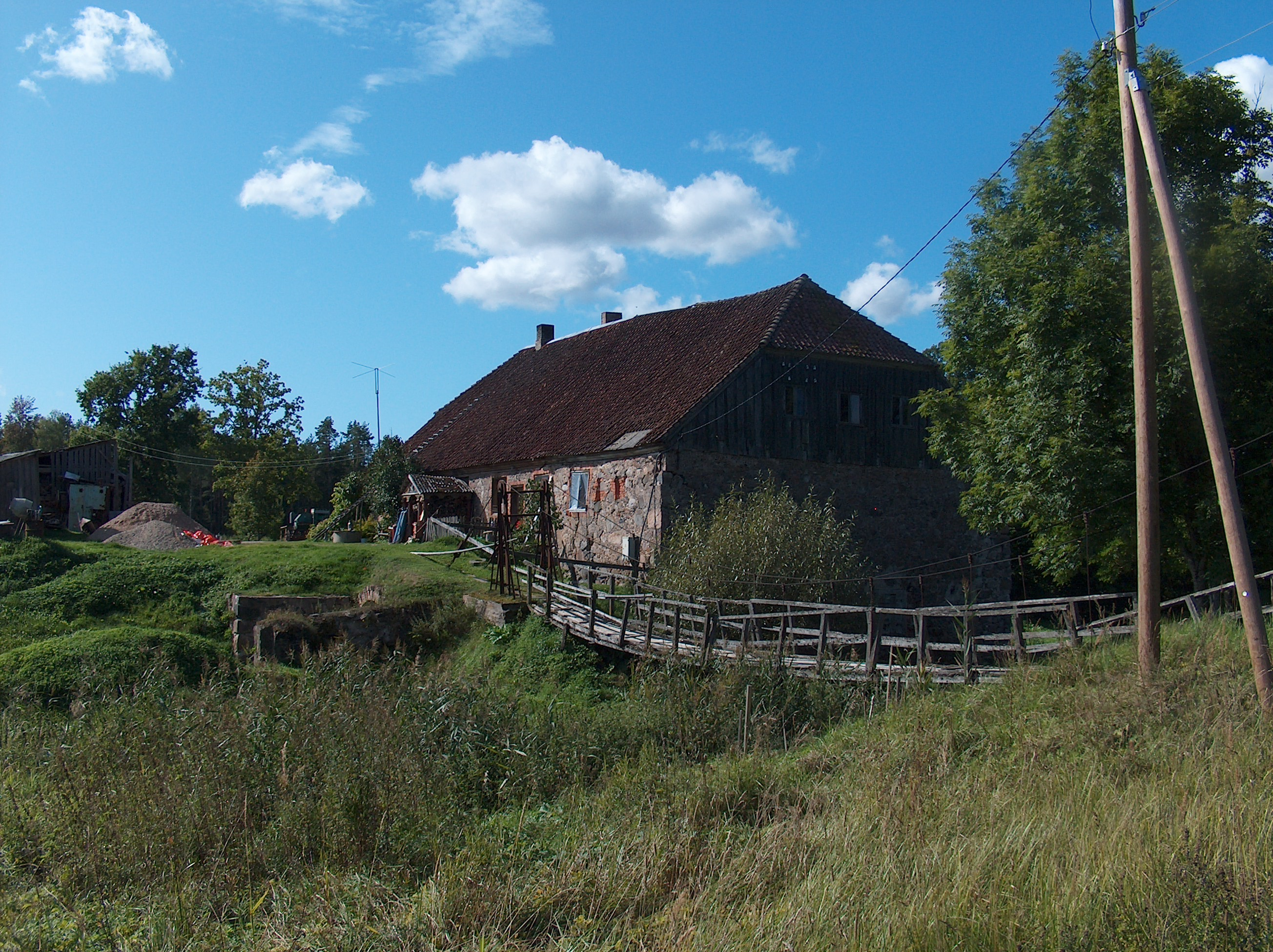 Iliņu dzirnavas